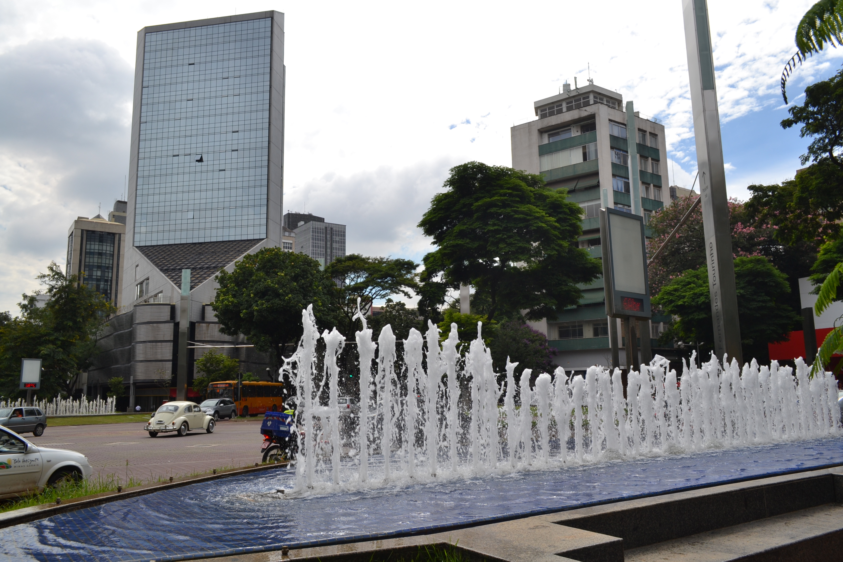 Praça Savassi, cruzamento entre avenidas Getúlio Vargas e Cristóvão Colombo, Belo Horizonte